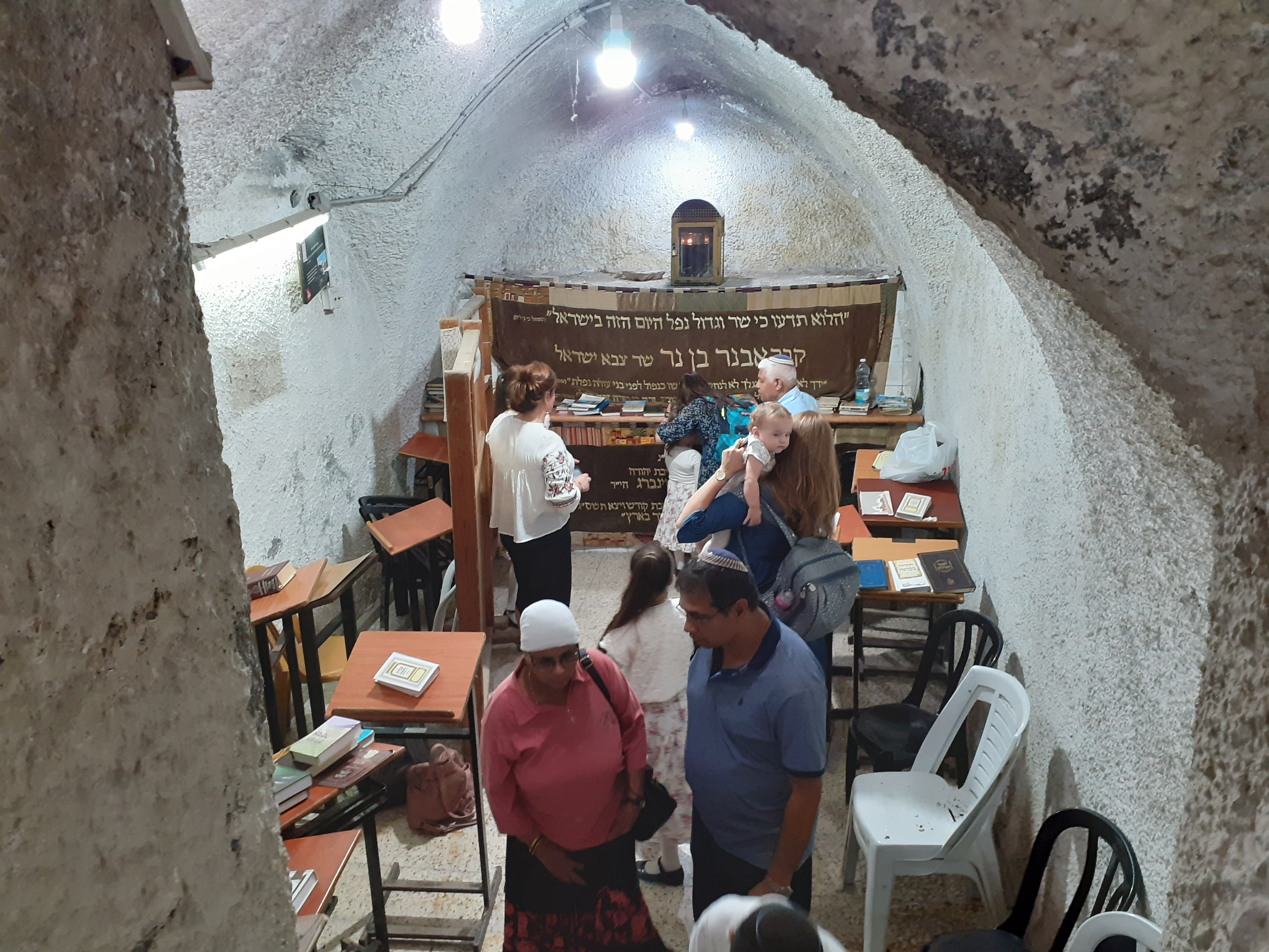 קבר אבנר בן נר